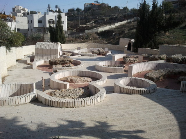 חלקת הרבנים הספרדים בבית העלמין העתיק בחברון